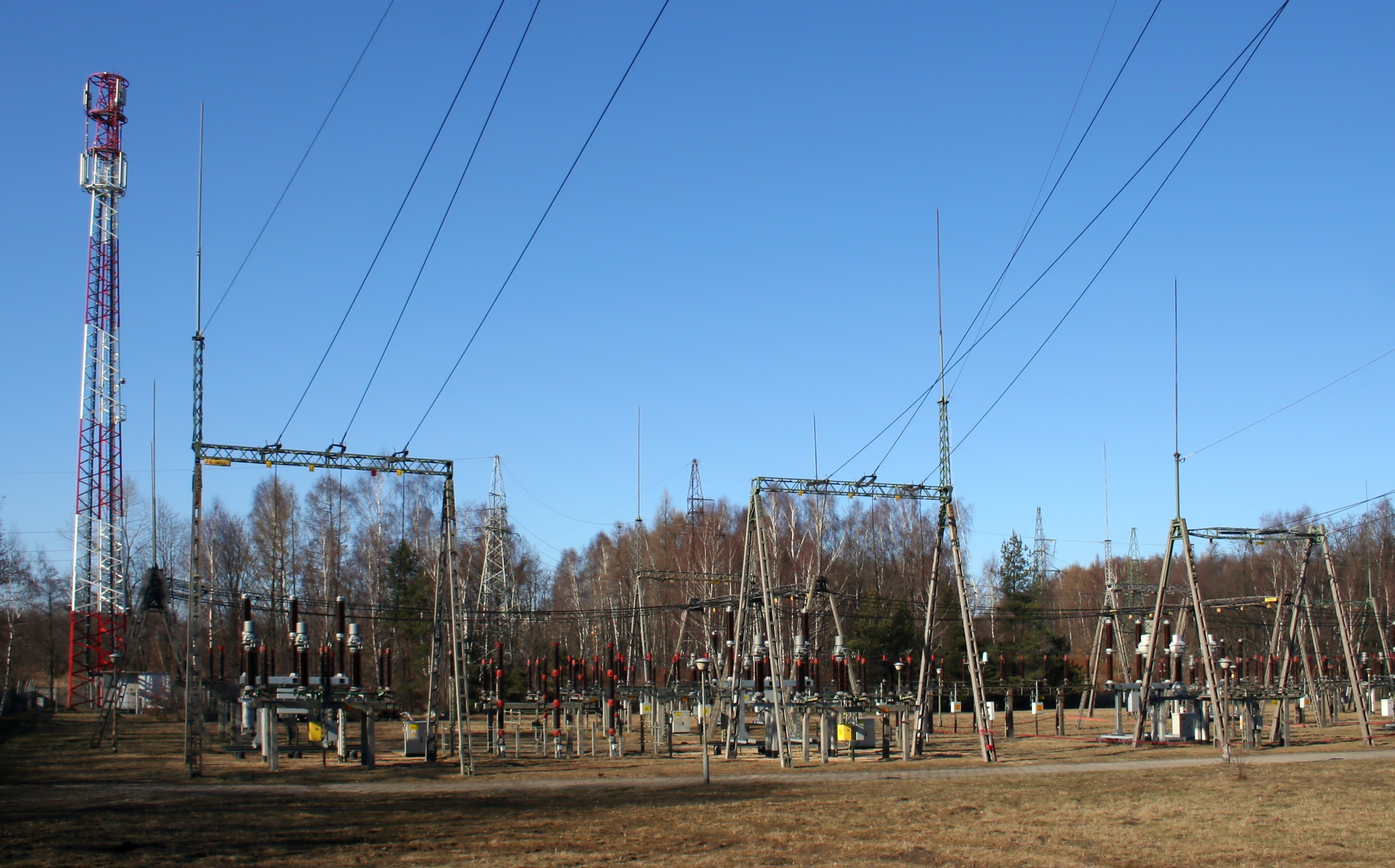 Częstochowa, Wały Dwernickiego - stacja elektroenergetyczna